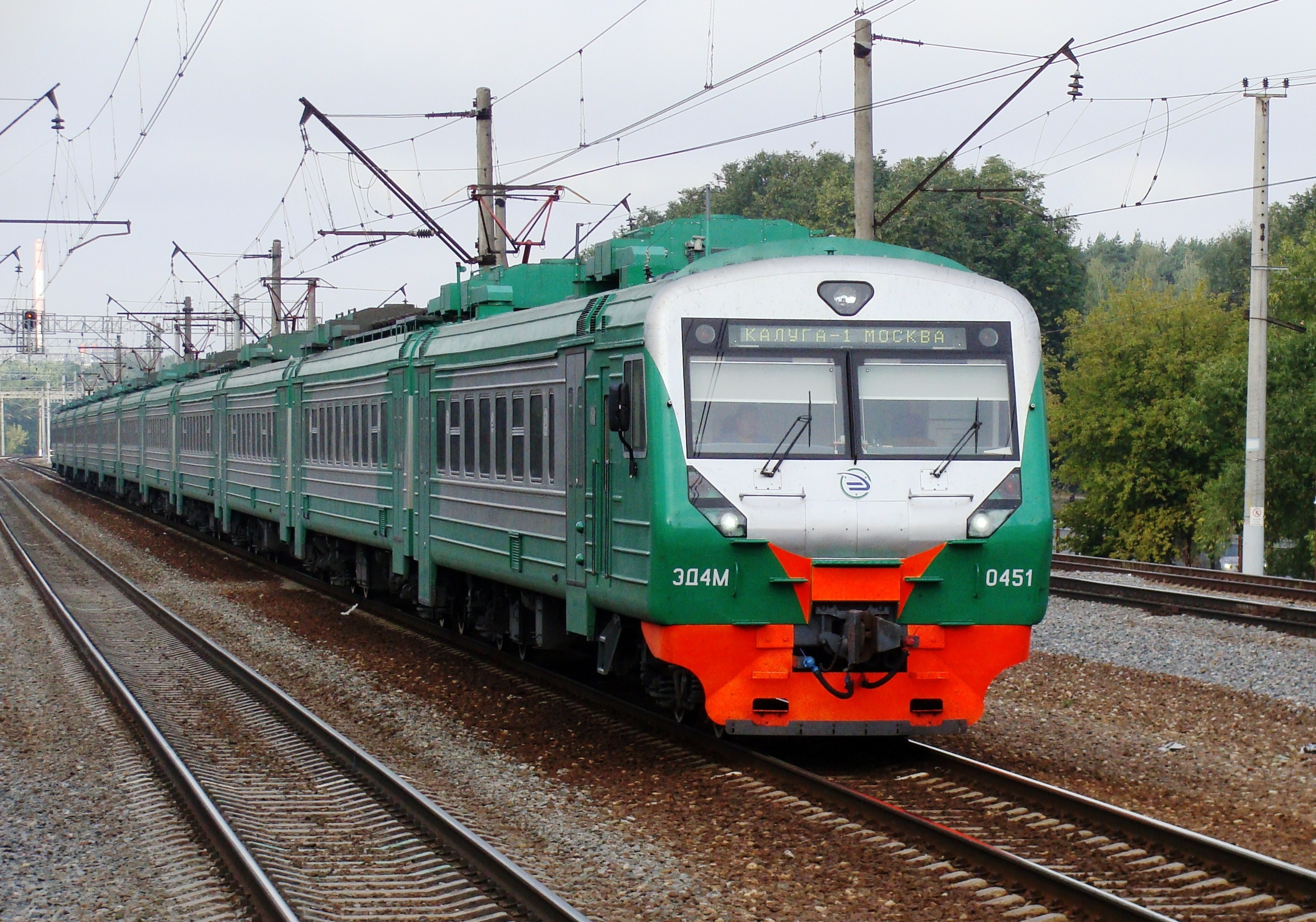 Электропоезд ЭД4М-0451 (экспресс Калуга-1 - Москва), перегон Солнечная - Очаково-1.